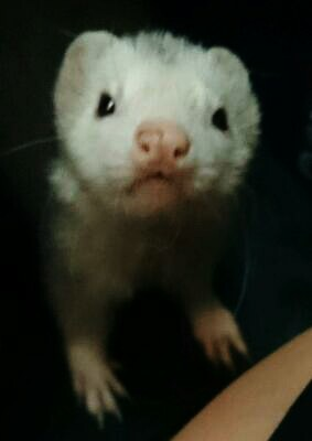 Magi(2012-02-02～2016-11-12)